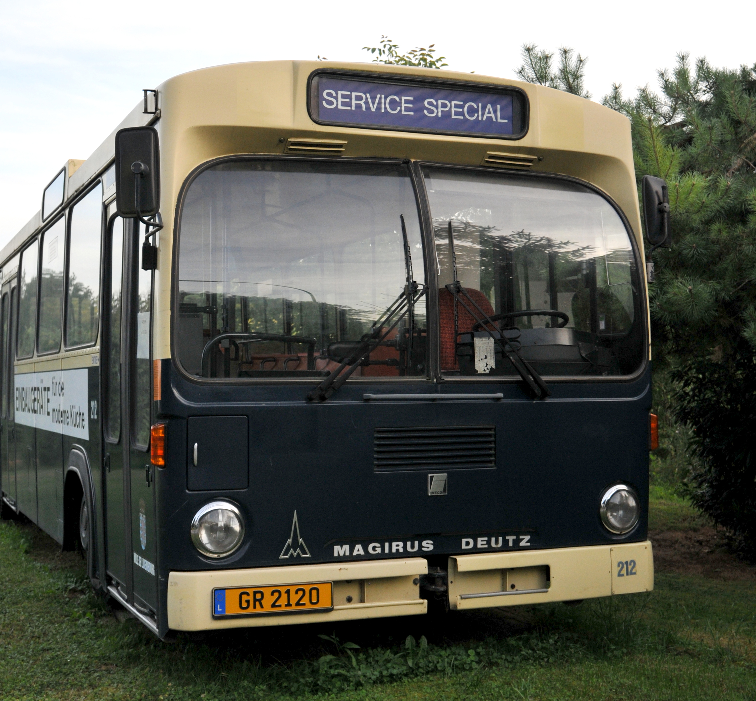 E Bus an engem Virgäertchen um Wolfsbierg zu Mutfert.